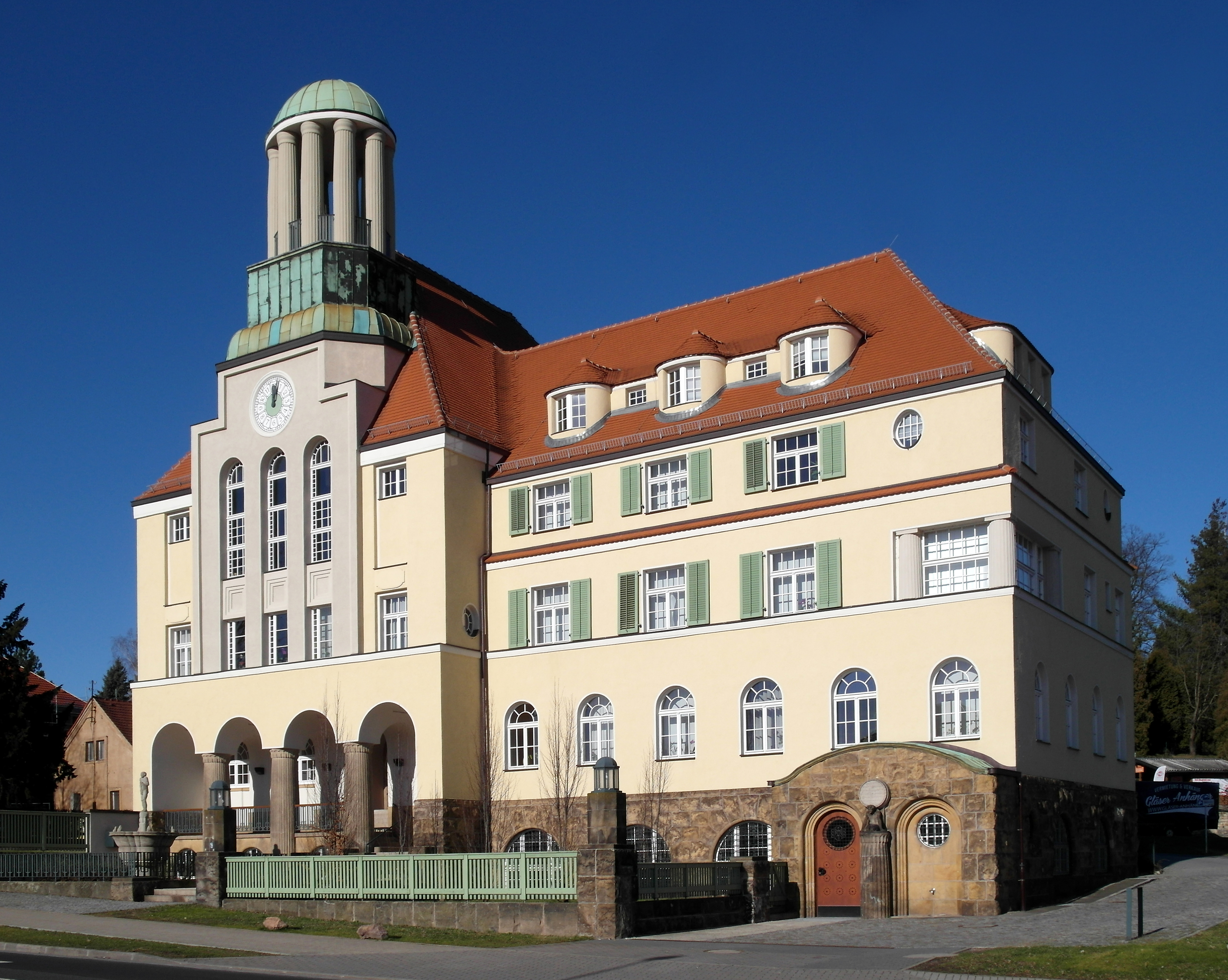 02.02.2018 01705 Freital-Döhlen, Lutherstraße 22: Historisches Rathaus Döhlen mit Säulentürmchen und grüner Kupferkuppel (GMP: 51.007008,13.650152). Das Gebäude wurde 1914-1915 nach Plänen von Rudolf Bitzan errichtet. Am 01.10.1921 wurde hier die Stadt Freital gegründet. Später verschiedenen Nutzungen, u.a. als Landratsamt. Ab 2012 Sitz der Städtischen Wohnungsgesellschaft Freital. [SAM3671.JPG]20180202110DR.JPG(c)Blobelt